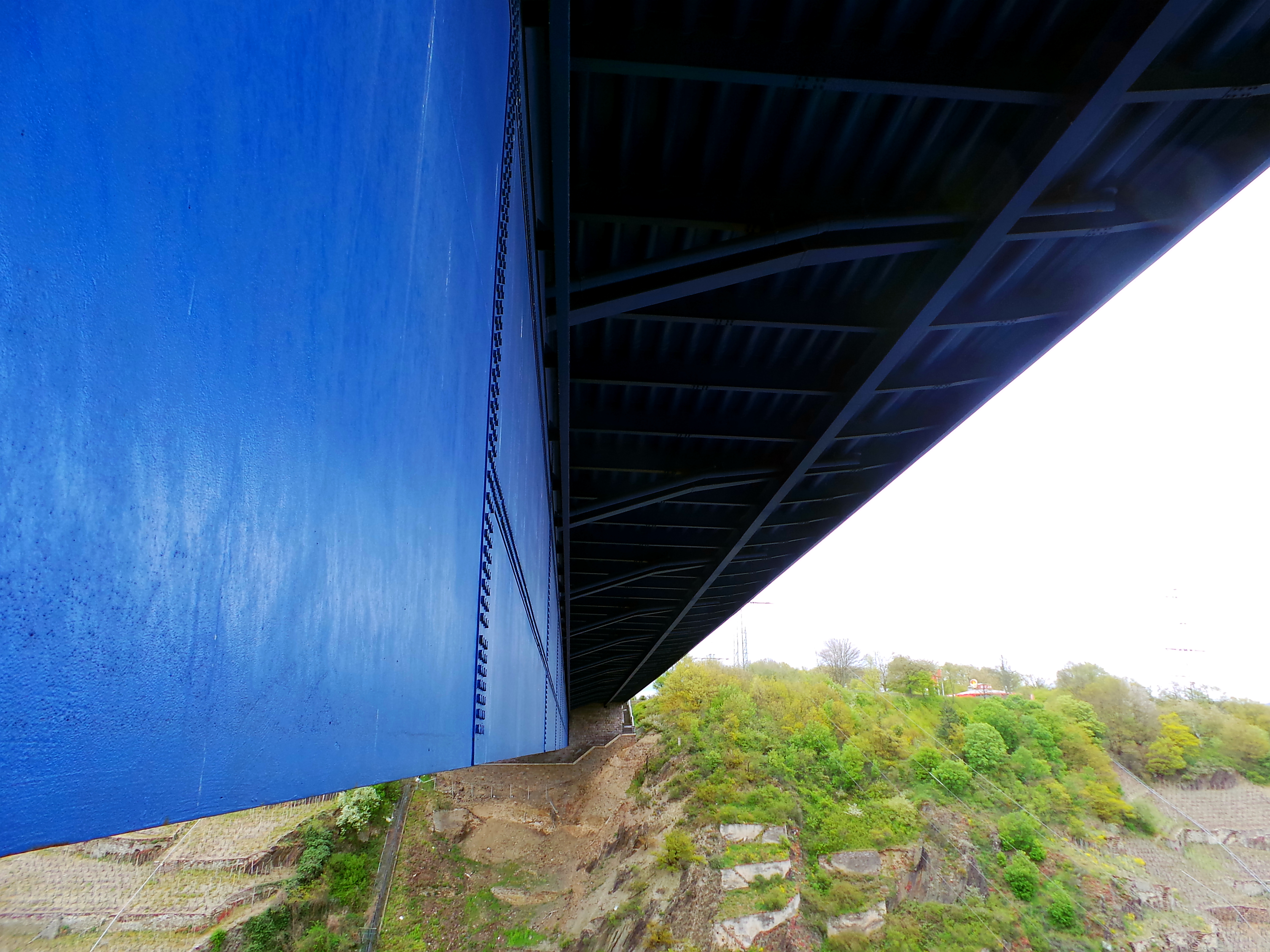 Unterhalb der Moseltalbrücke (Ostseite, aufgenommen von Pfeiler 1); rechtseitig ist die Raststätte Winningen-Ost erkennbar